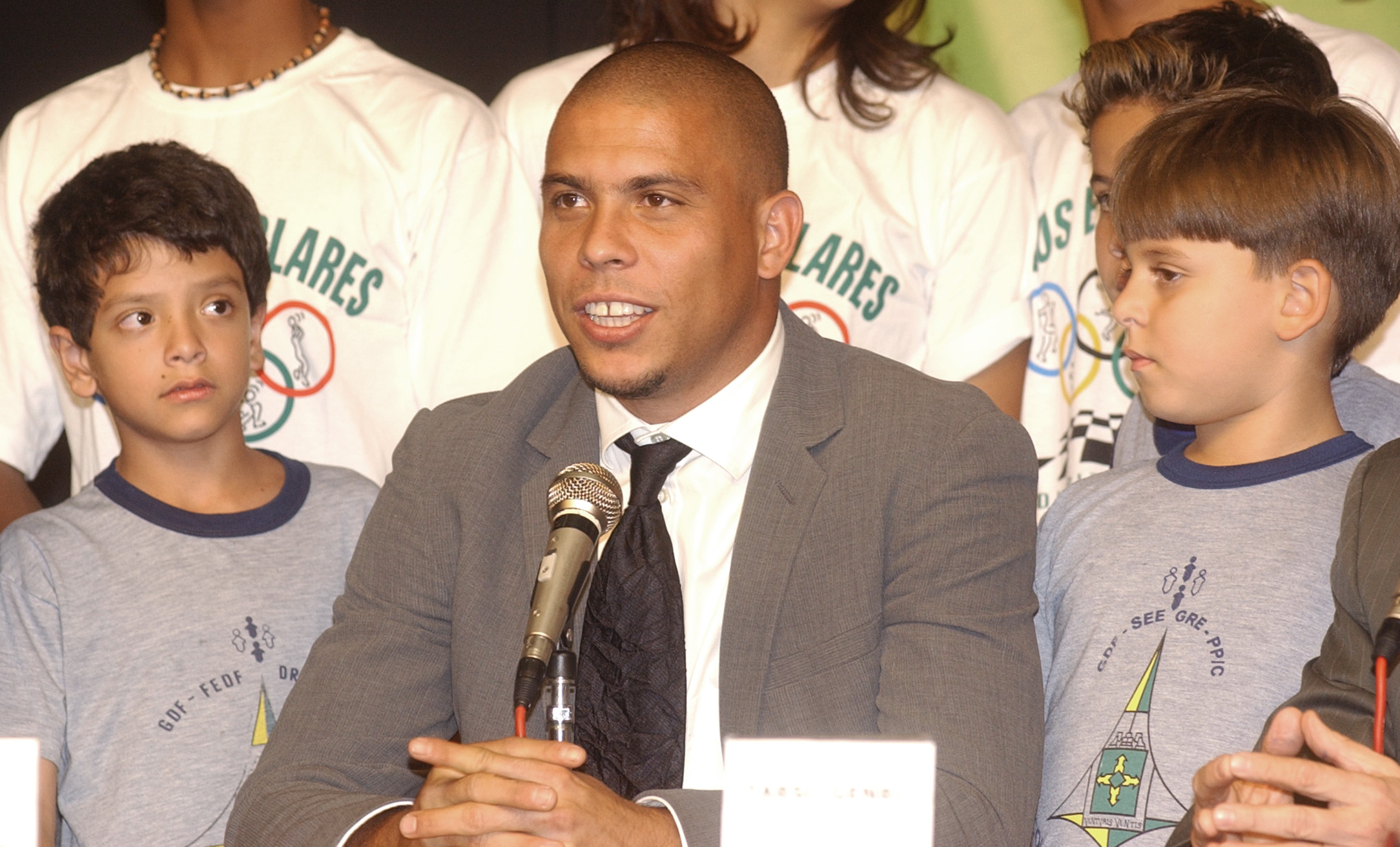 Entrevista coletiva do futebolista brasileiro Ronaldo Nazário no Ministério da Educação.